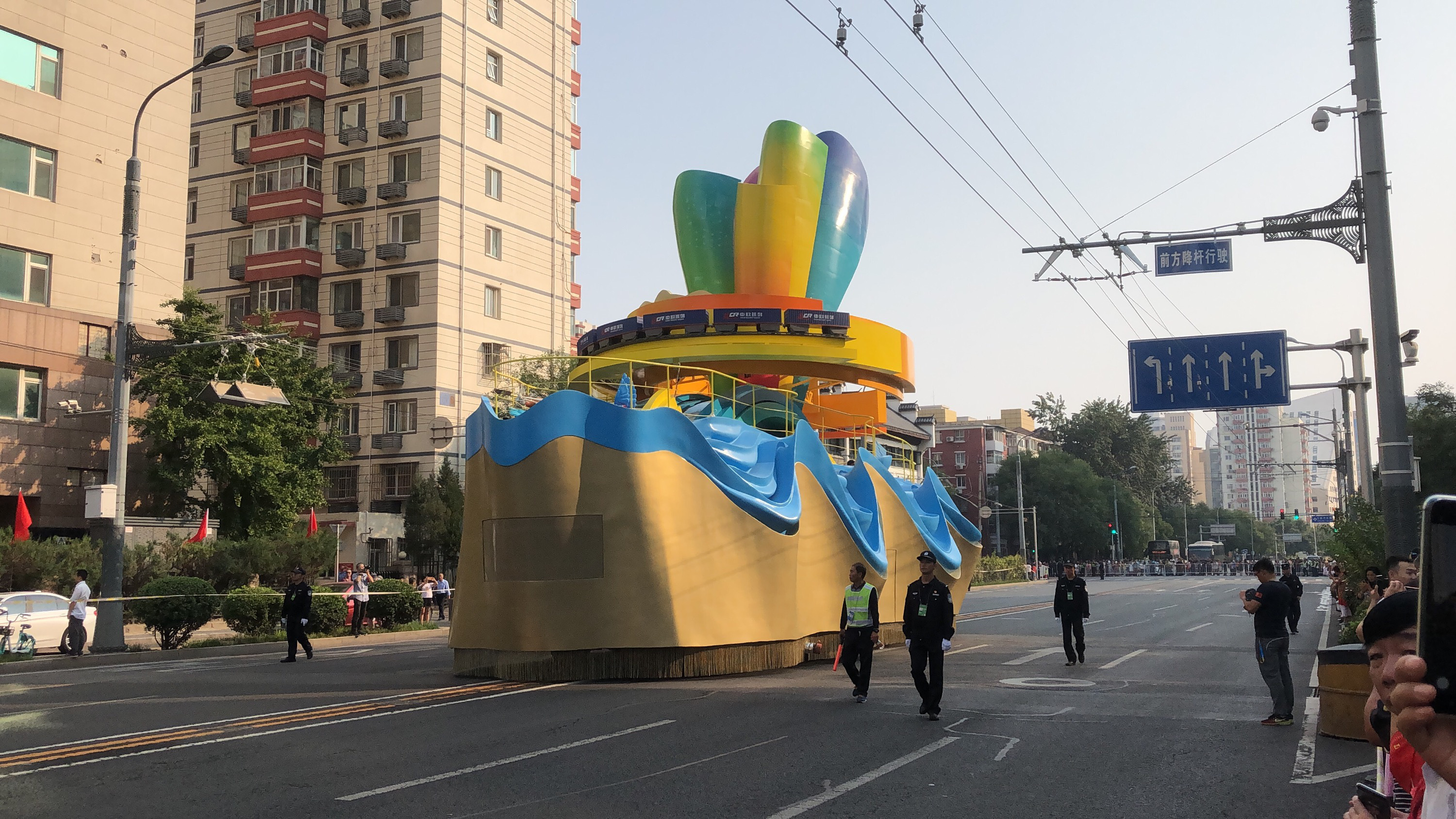 中文（中国大陆）: 图为庆祝中华人民共和国成立70周年大会所用之花车